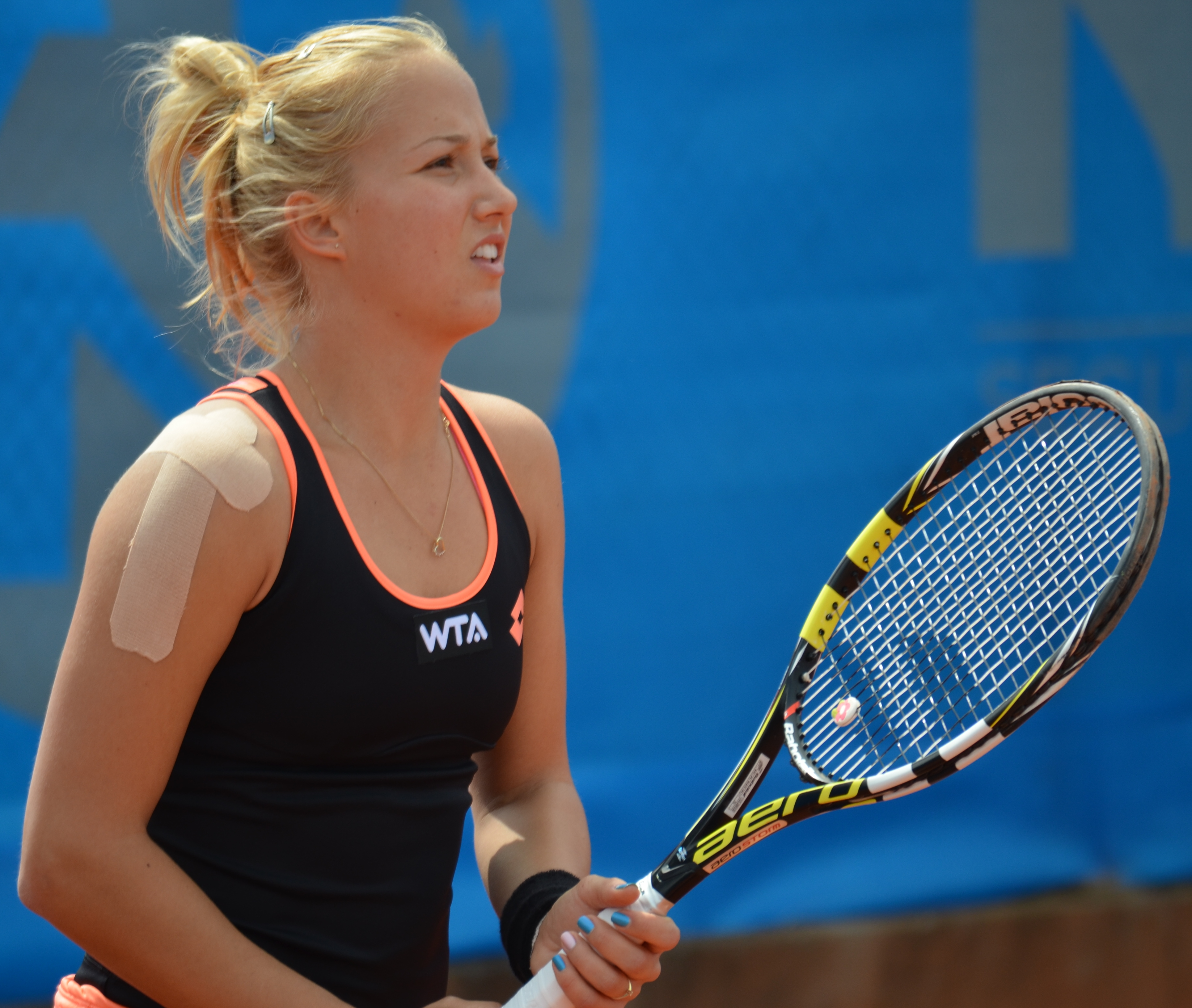 Paula Kania bei der Erstrundenbegegnung der Qualifikation des Nürnberger Versicherungscup 2014 gegen Tereza Martincova